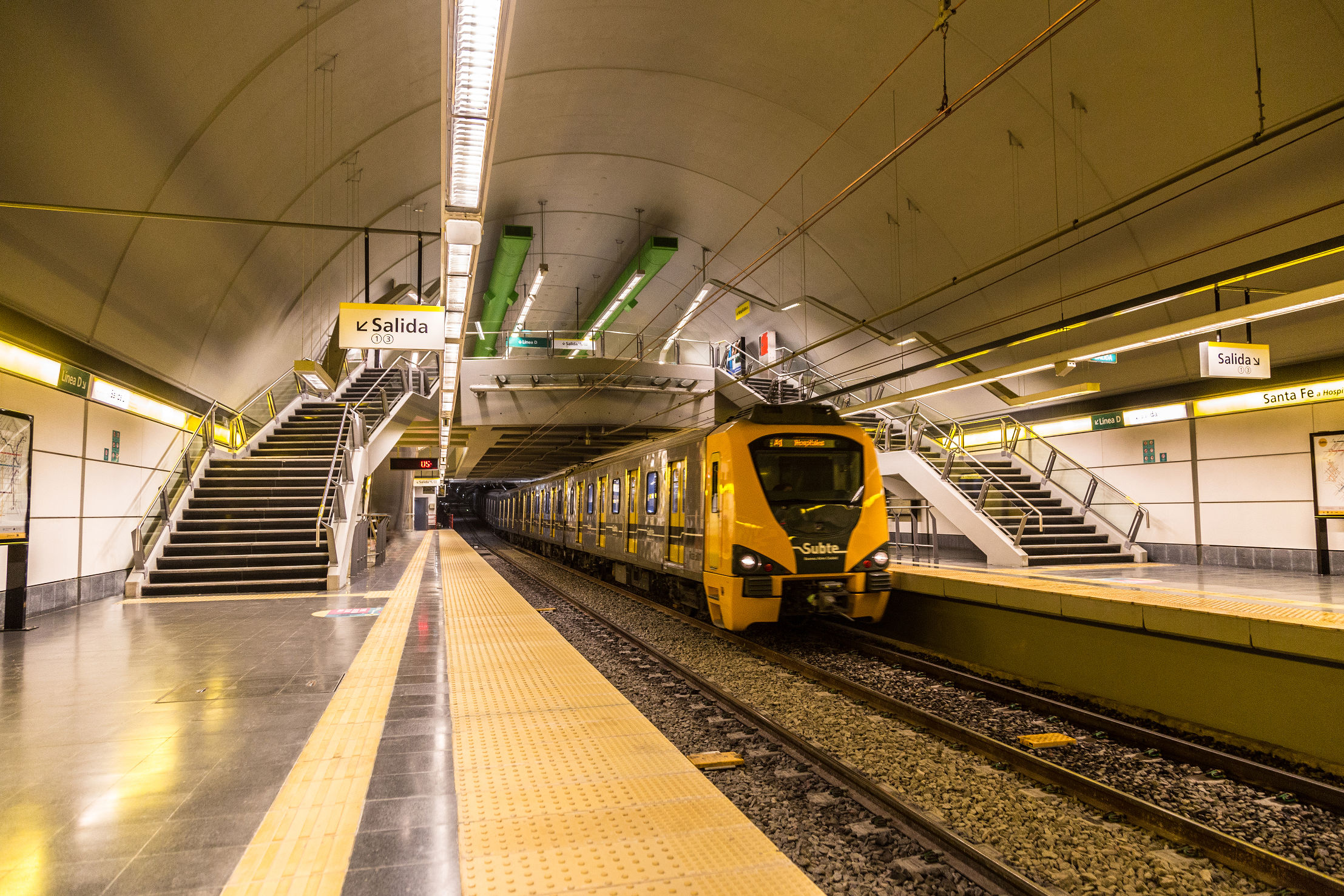 Línea H, Subte de Buenos Aires.